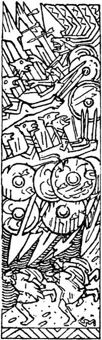 Gerhard Munthe: Illustration for Harald Hårfagres saga. Snorre 1899-edition. vignett Slaget i Hafrsfjord